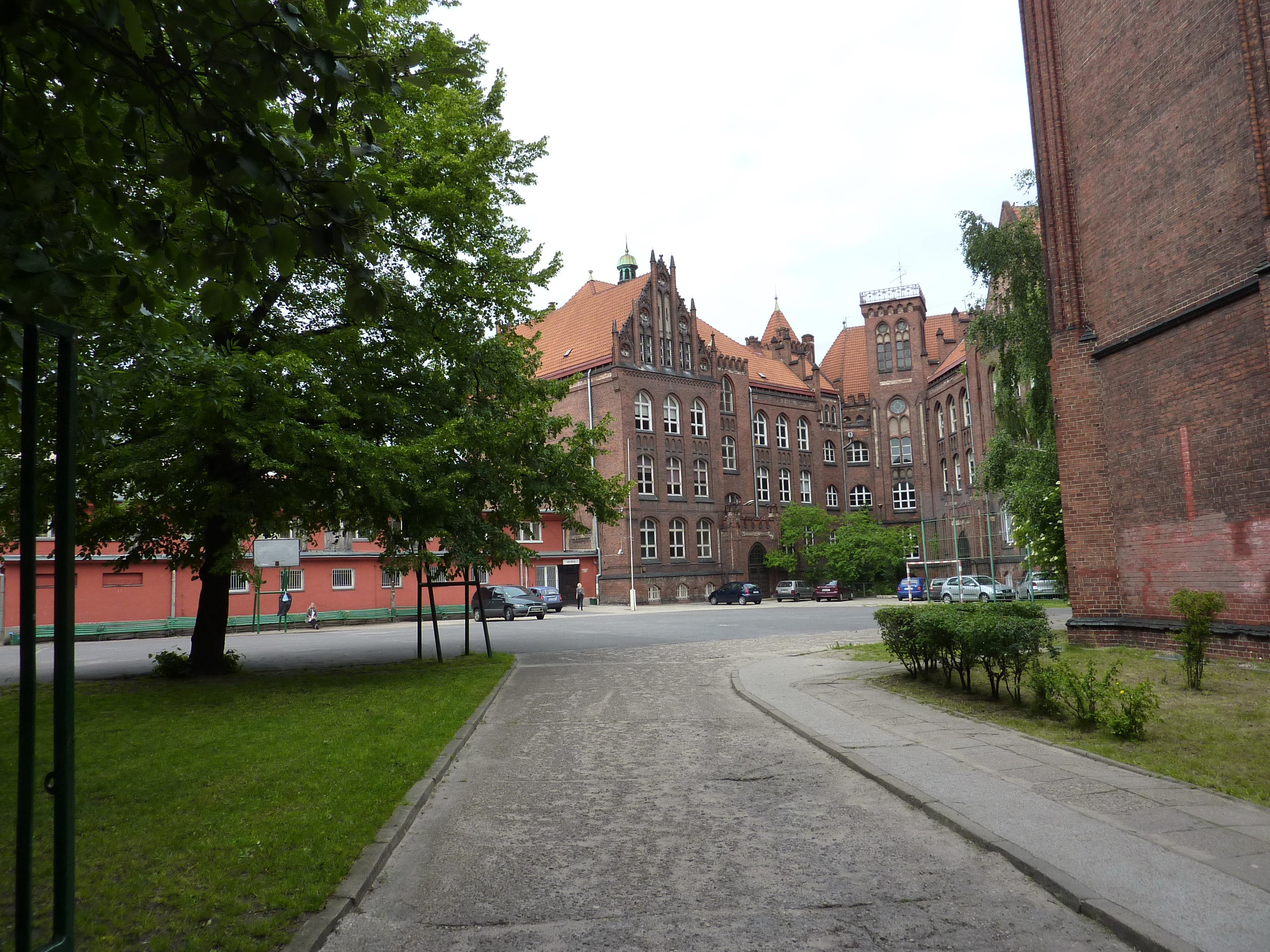 Widok na gmach liceum od strony ulicy Wałowej.